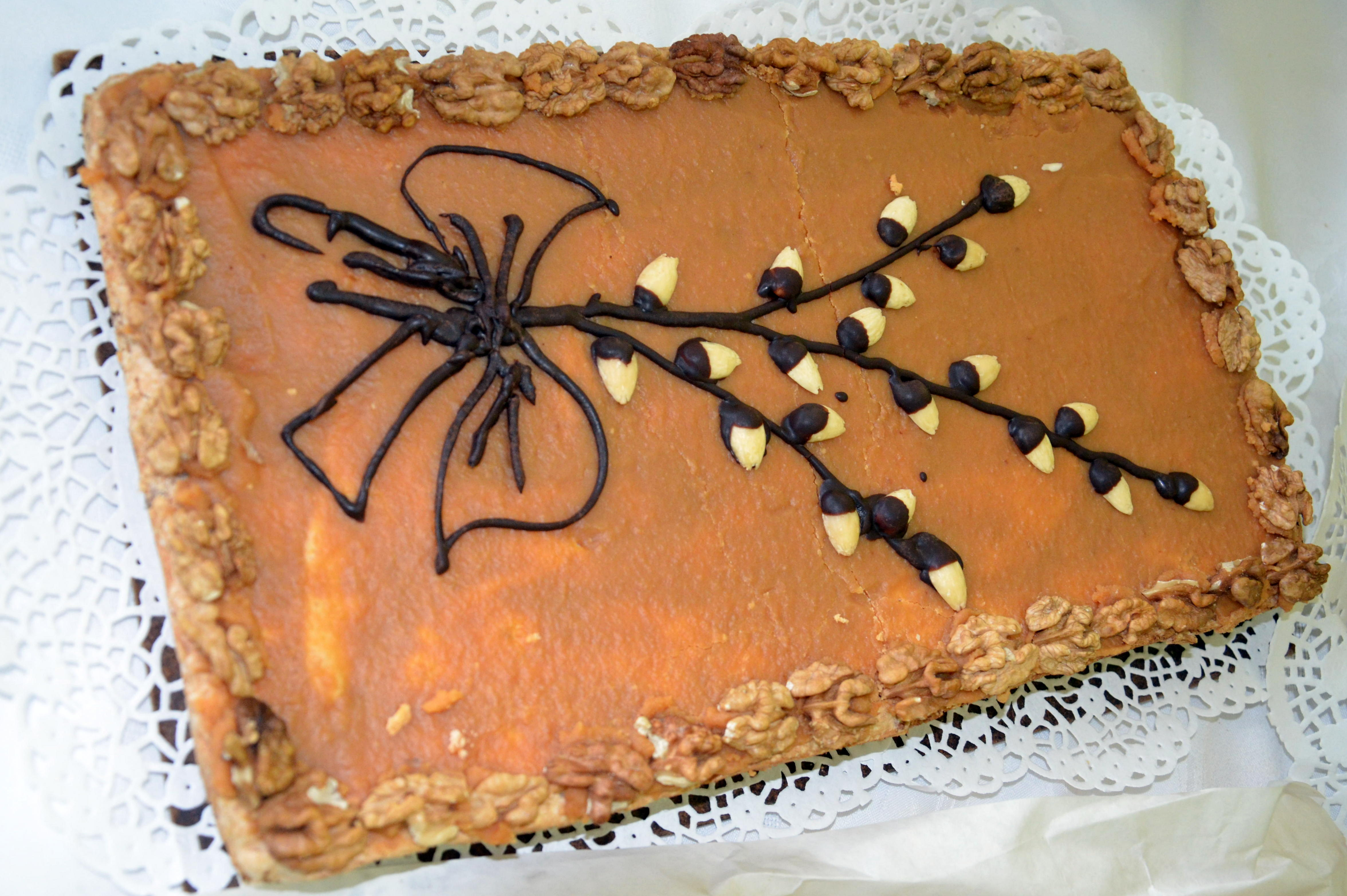 Nowotaniec Osterkirmes 2014 bei Sanok